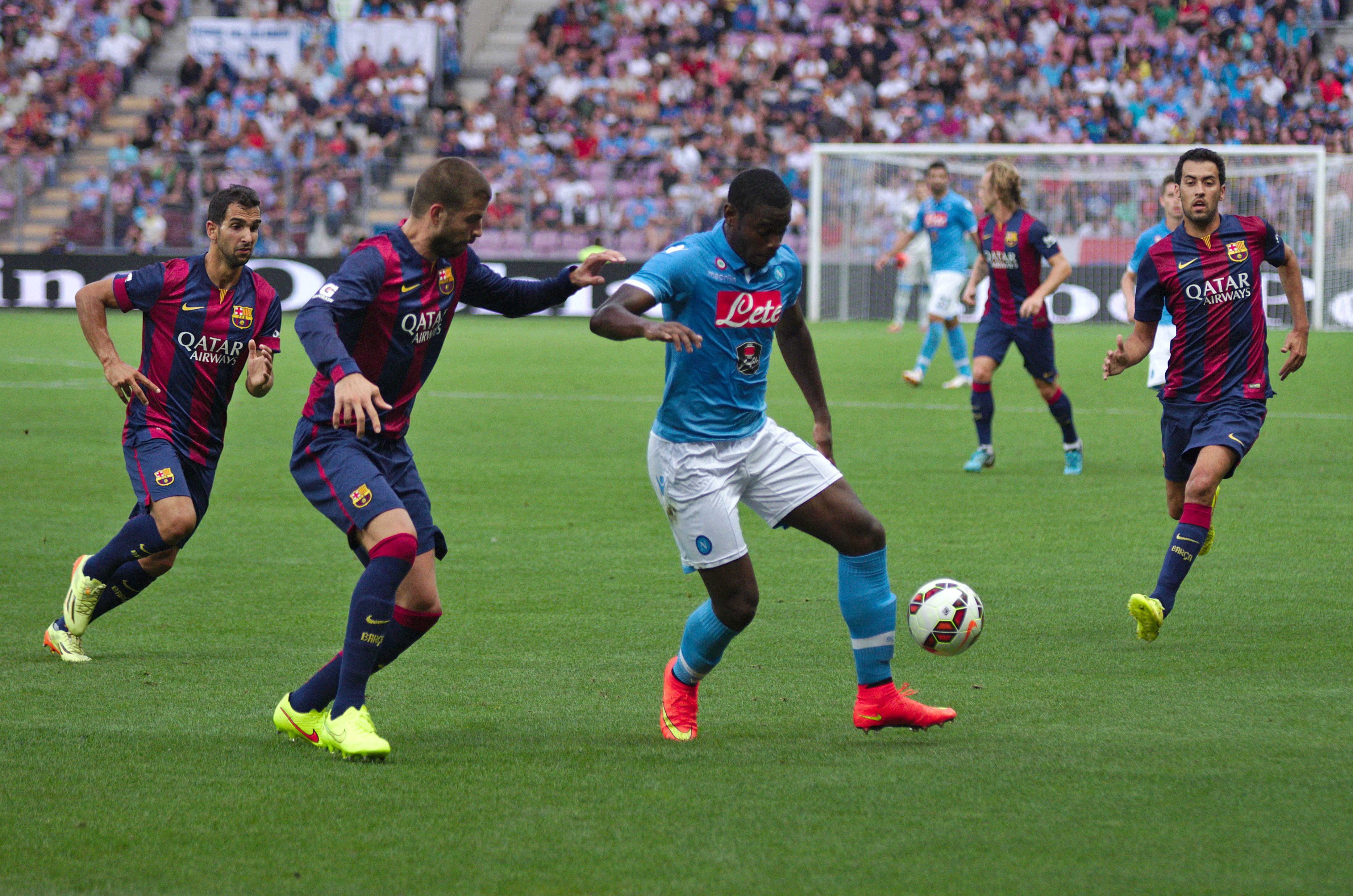 Barça - Napoli - 20140806